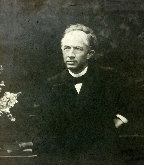 Emil Müller, ev. Pfarrer und Heimatforscher in Grünstadt (+ 1918)